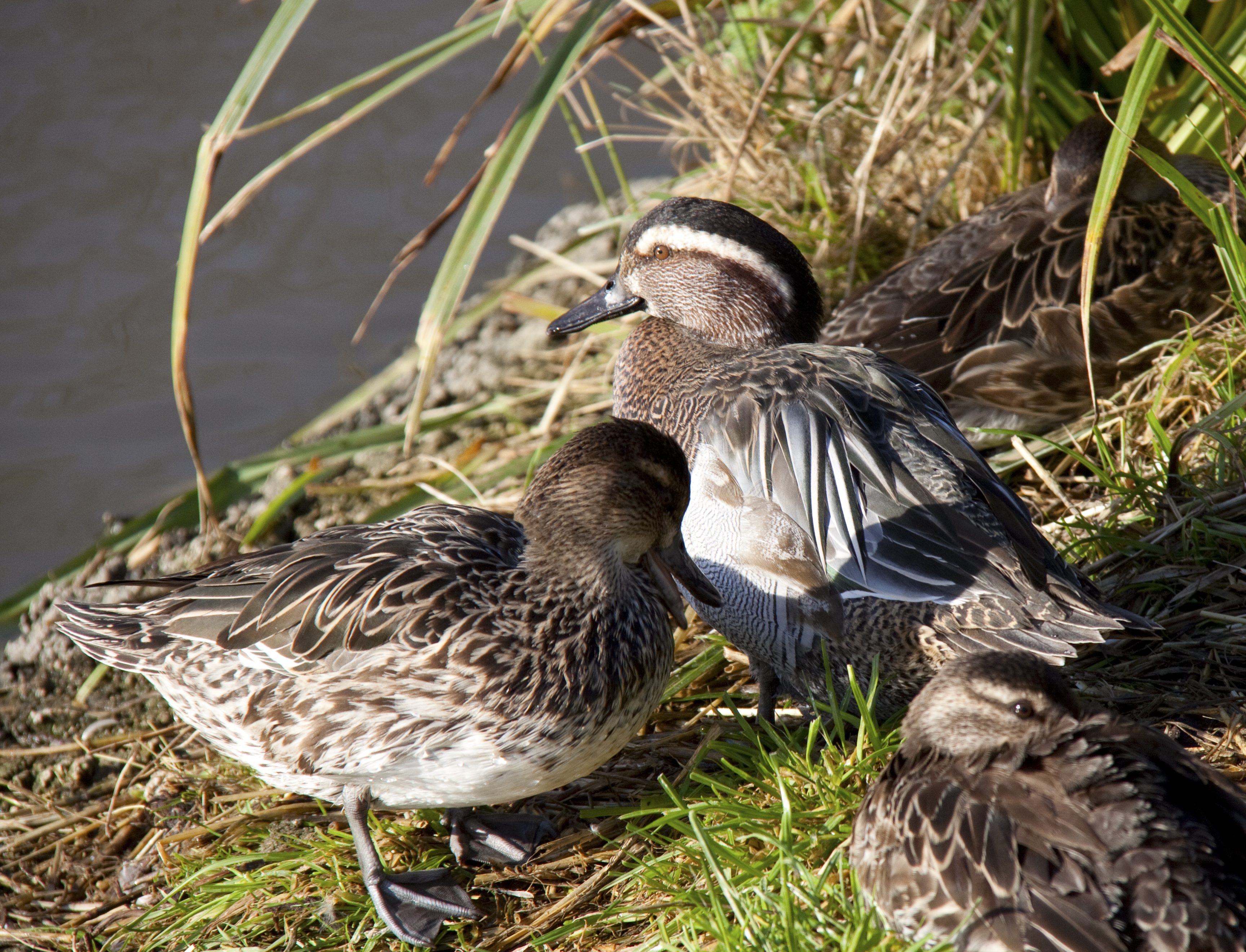 Garganey Anas querquedula Male and females